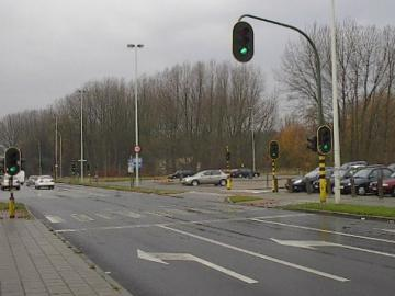 Verkeerslichten aan de Blancefloerlaan op Linkeroever